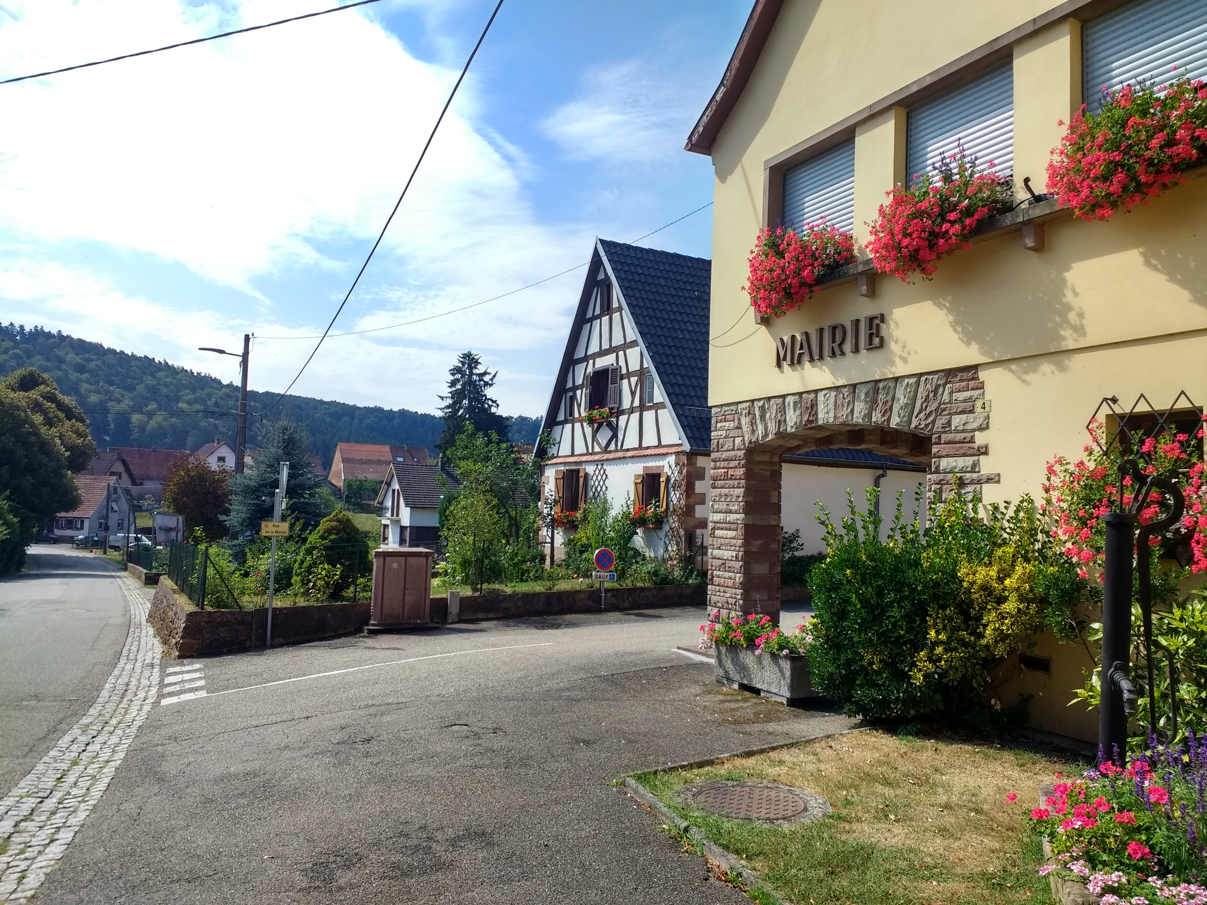 Mairie de Zittersheim